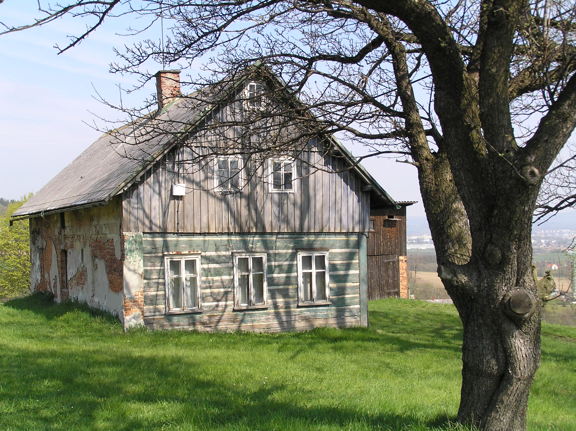 lidová architektura v Šimonovicích, ul. V Zatáčkách čp. 40